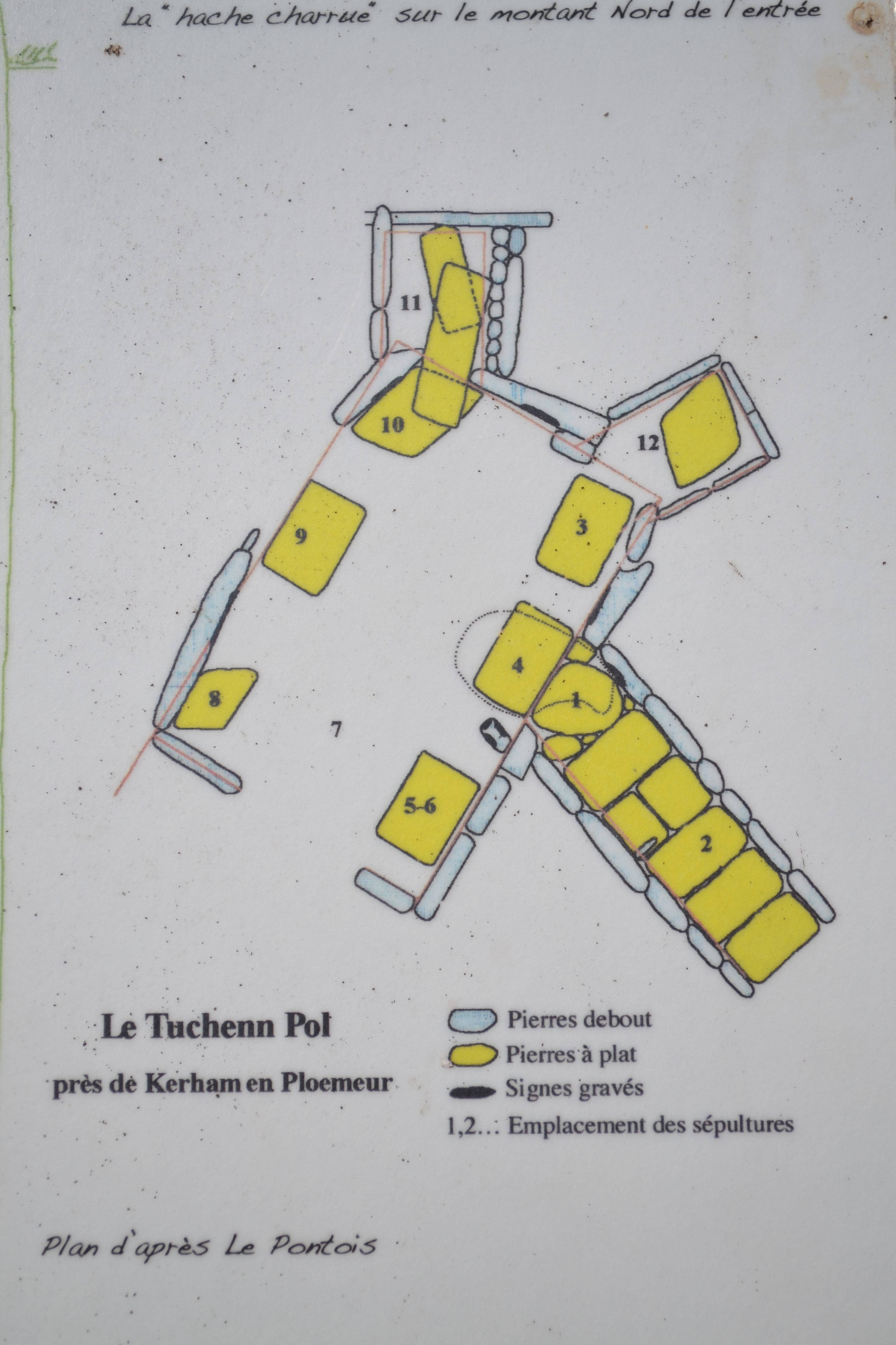 Tumulus Tuchenn Pol, Plœmeur,Morbihan